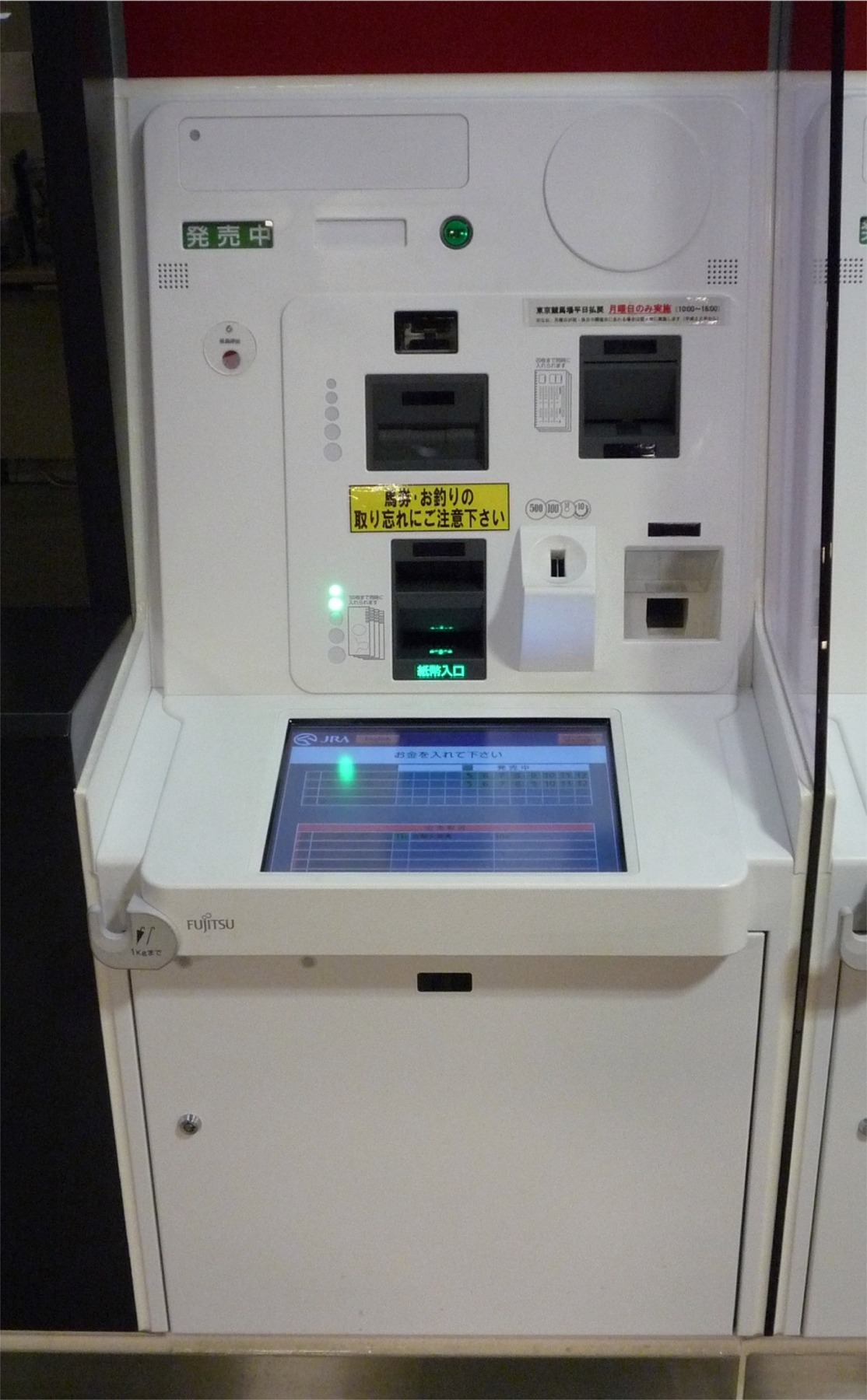 日本中央競馬会（JRA）勝馬投票券発売機